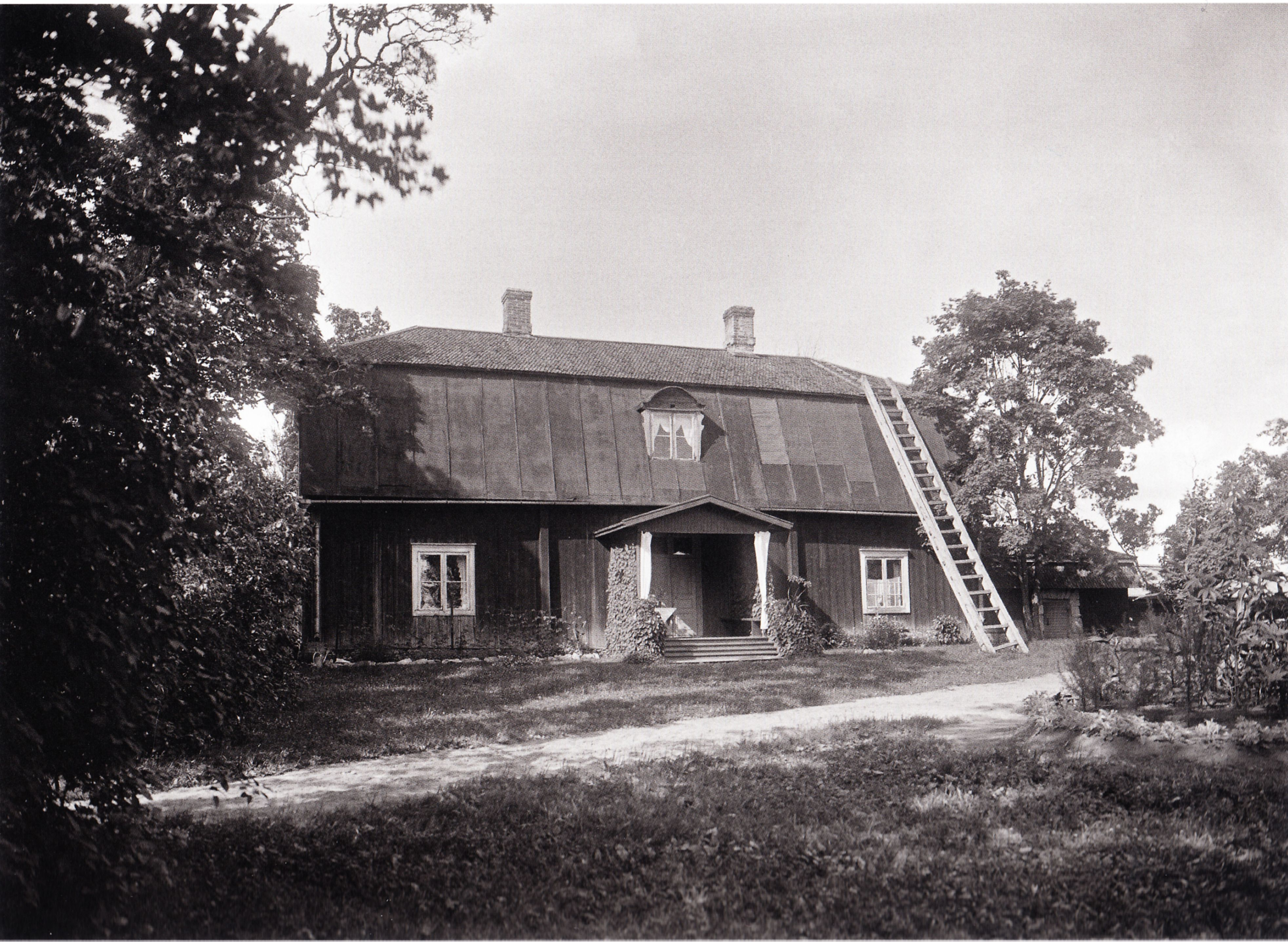 Olkkalan vanha päärakennus